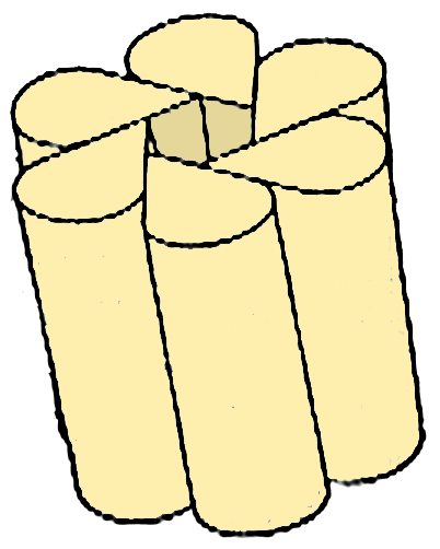 connexin